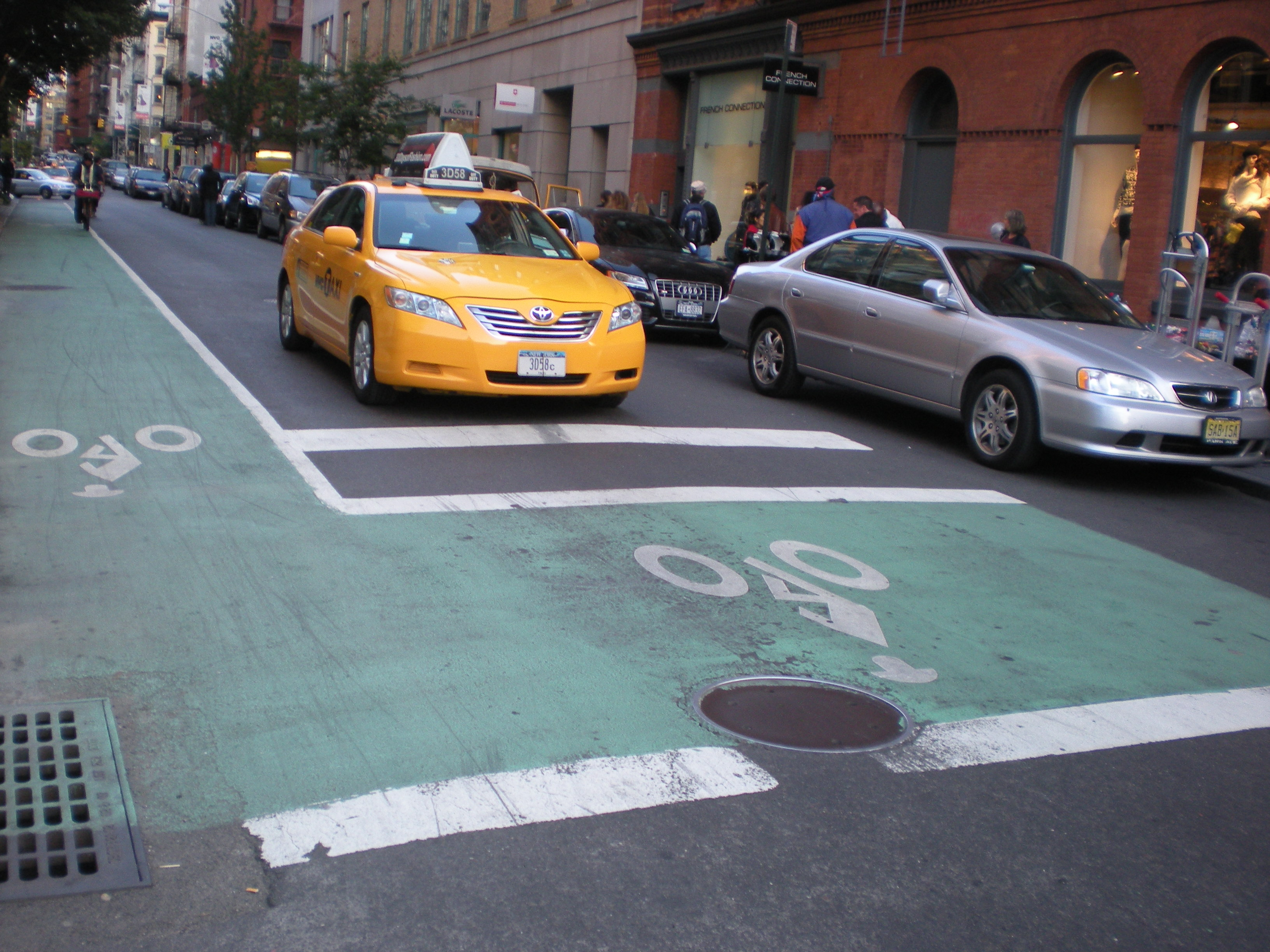 WSTMtag R2